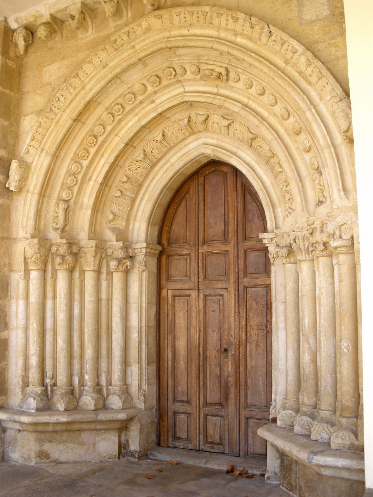 Matauco (Álava) - Iglesia de San Pedro Apostol